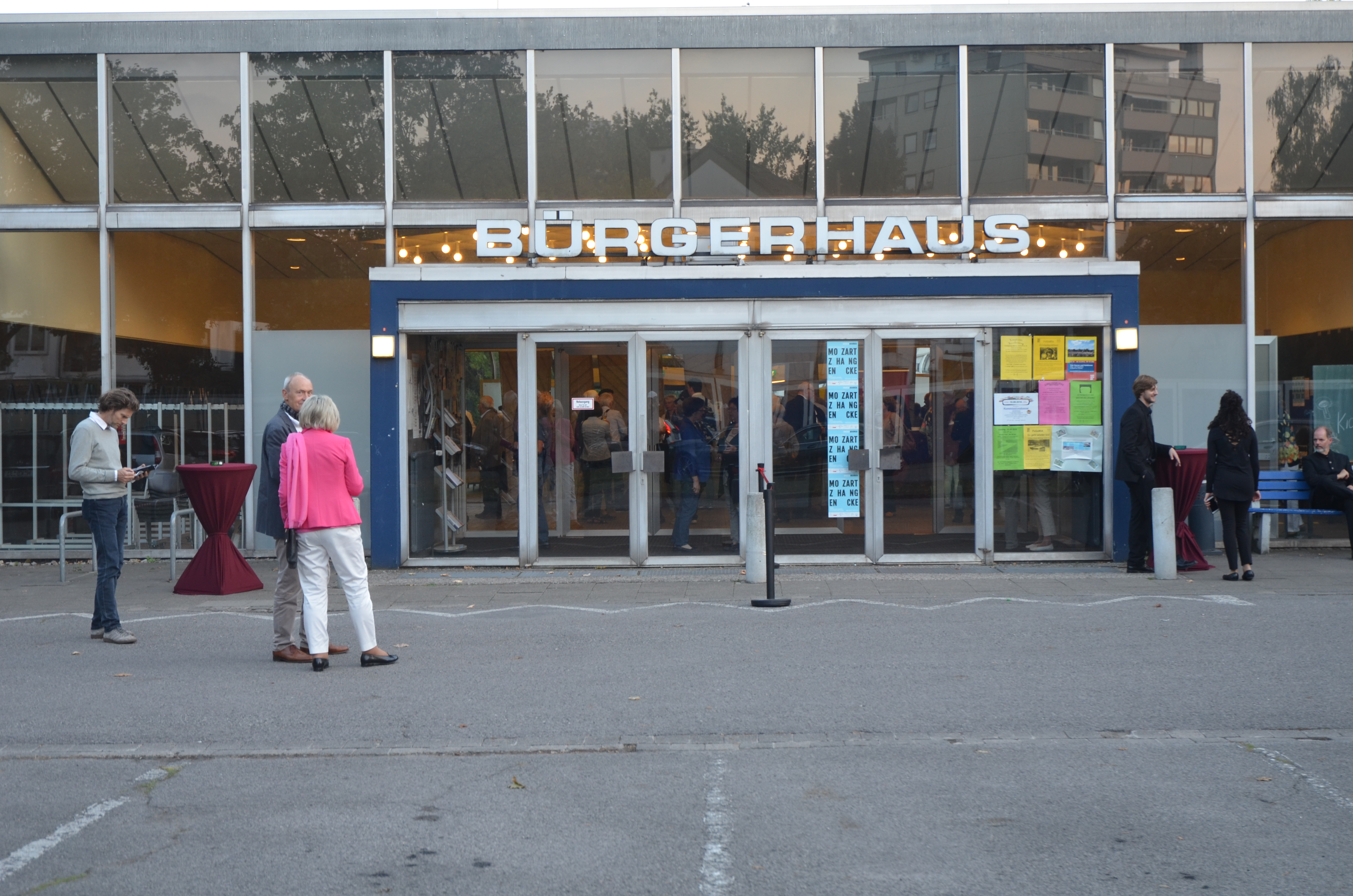 Anlässlich seines 30sten Gründungsjubiläums veranstaltete der Freundeskreis Hannover am 14. September 2018 im Bürgerhaus Misburg das Klassik-Konzert „Jupitersinfonie, Mozarts Prisma - night of music“ Unter der Leitung des Komponisten und Dirigenten Thorsten Encke spielte Solisten und das Orchester musica assoluta Kammermusik rund um Mozart mit dem Pianisten Haiou Zhang am Flügel ...